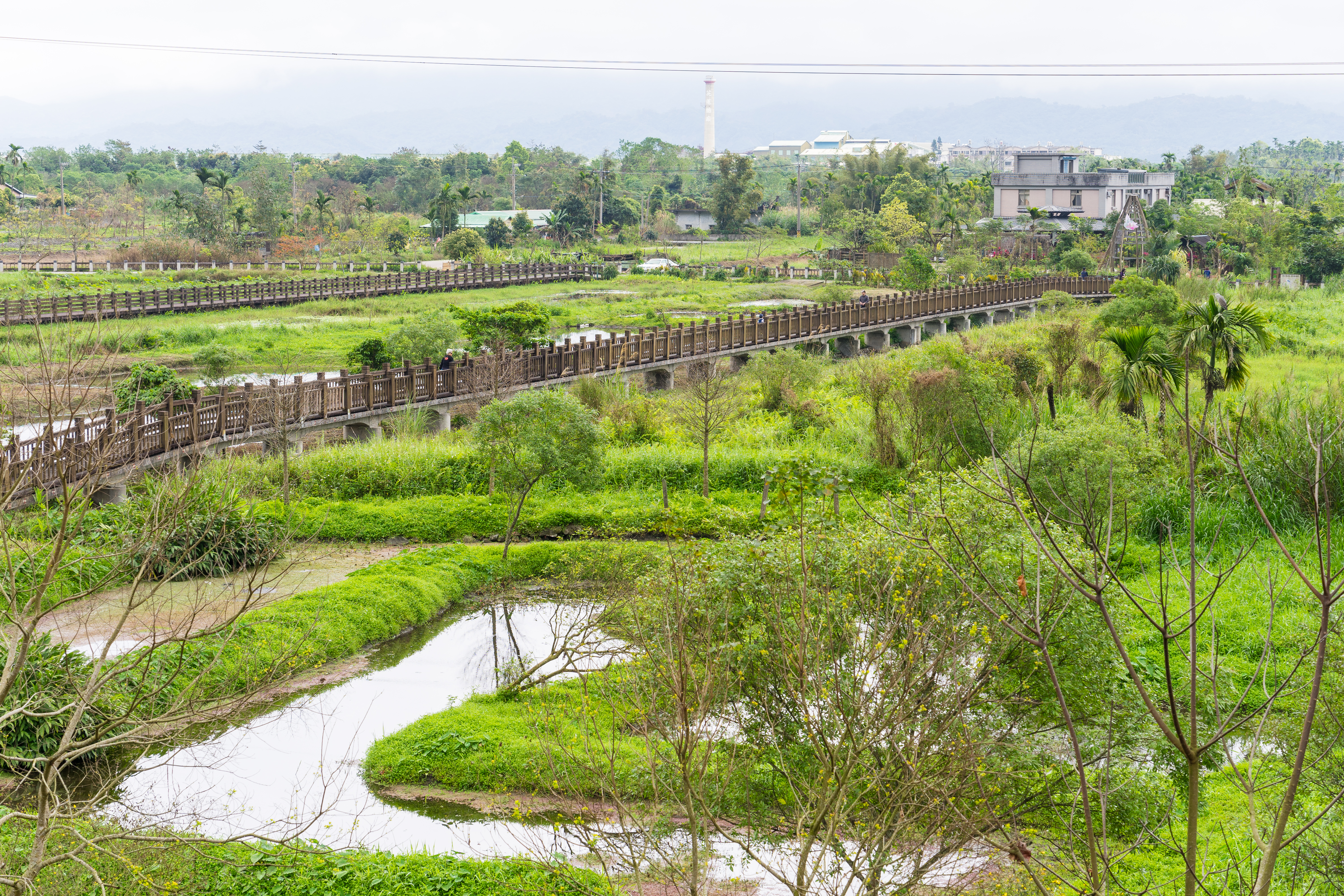 Vataan Wetland Park